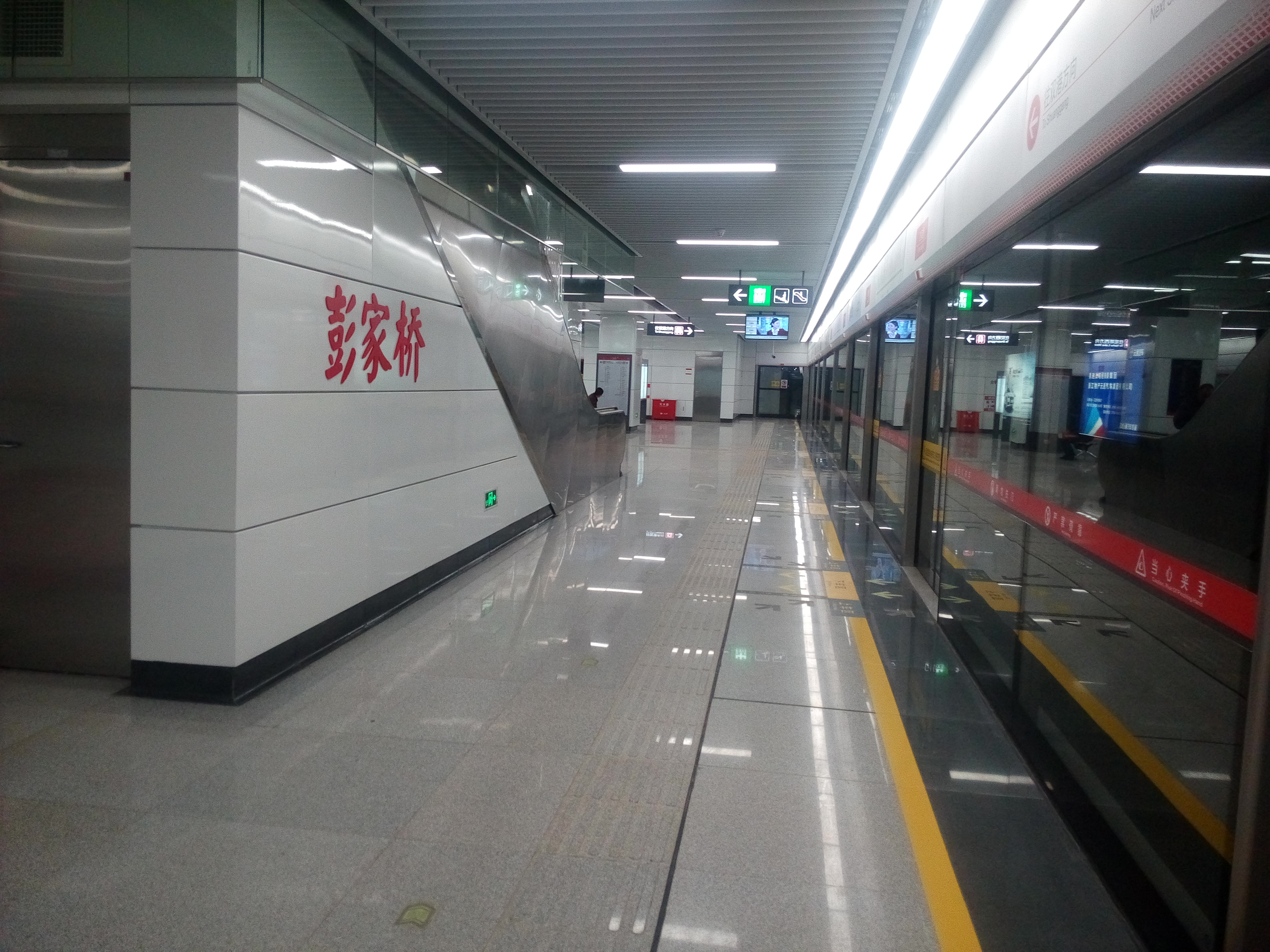 彭家桥站站牌和双港方向站台